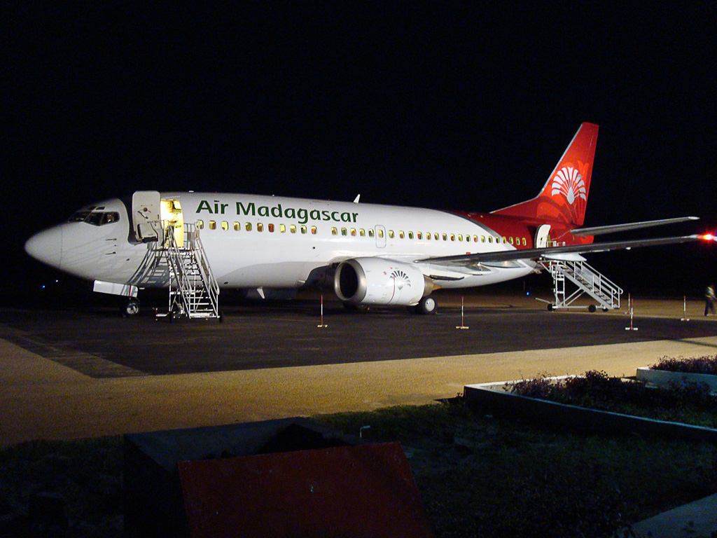 Boeing 737-300 d'Air Madagascar sur le tarmac de l'aéroport de Fort-Dauphin.